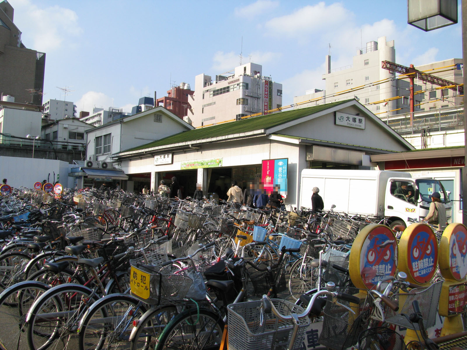 JR大塚駅駅舎